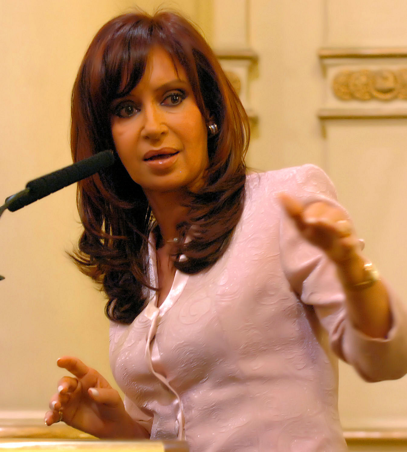 Cristina Fernández brinda un discurso durante la firma de convenios entre AySA y municipios bonaerenses.